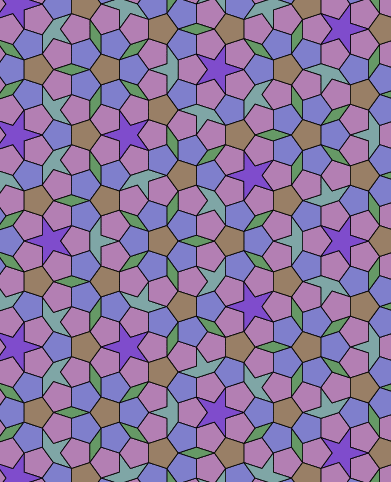 Una teselación de Penrose construida del conjunto original de seis baldosas de penrose (Algunas veces llamado la teselación P1)